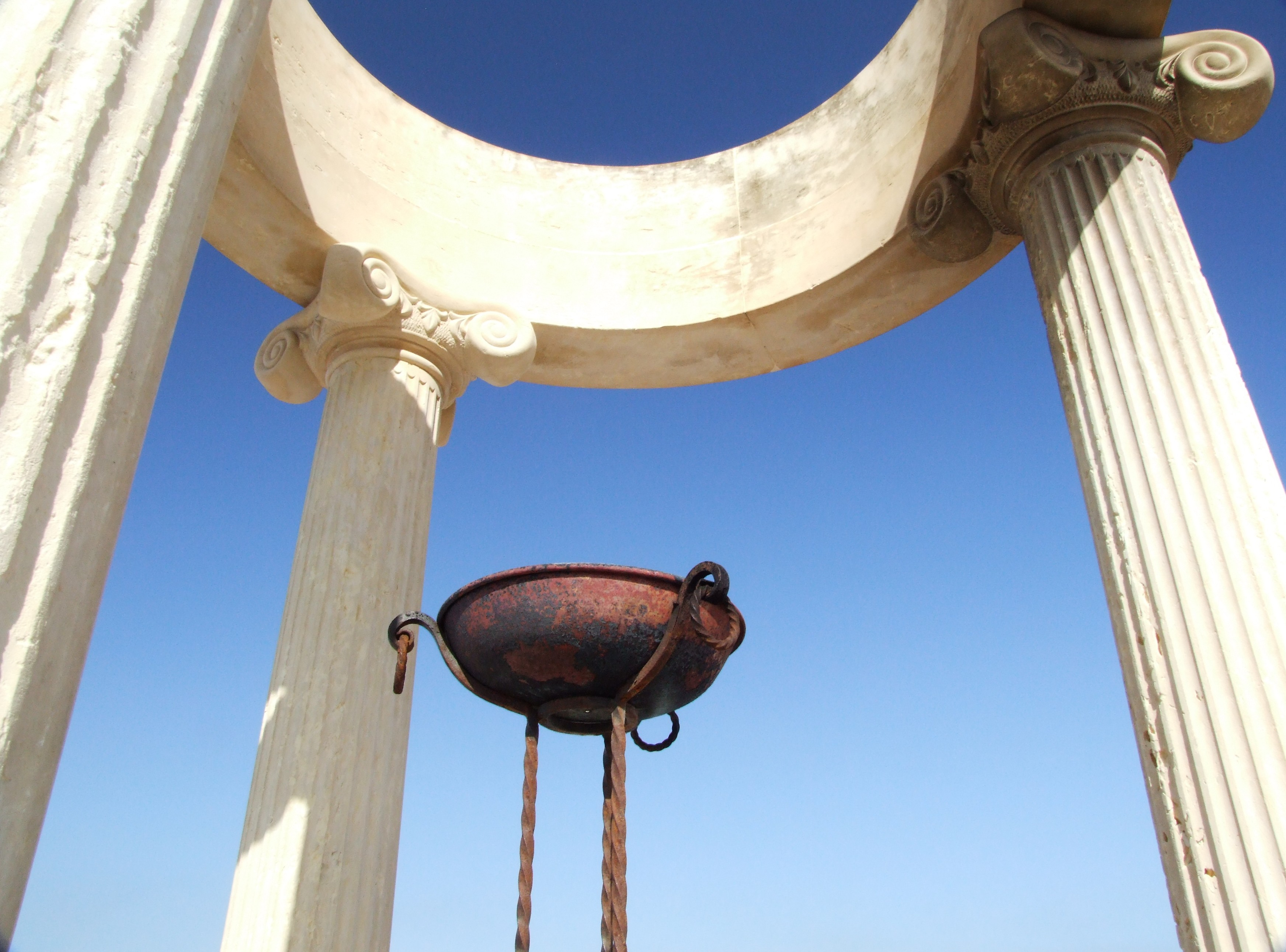 Il tempio "Olimpico" eretto a ricordo della fondazione da parte di coloni greci della cittadina di Naxos, a Giardini-Naxos, ai piedi di Taormina.